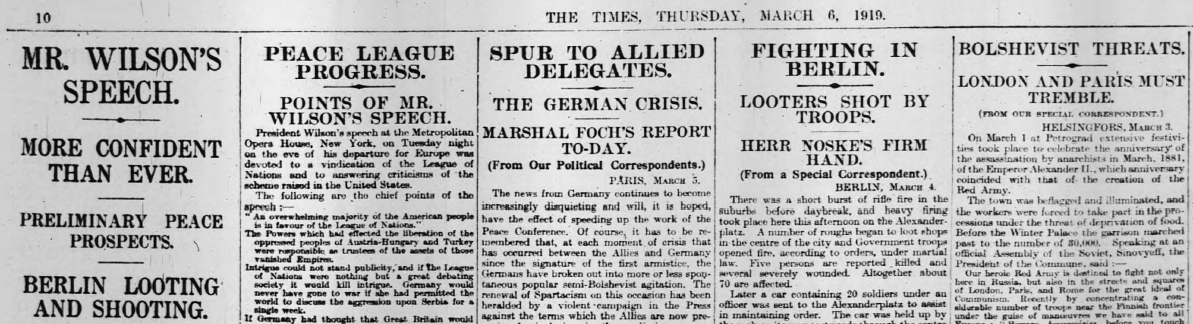 The Times - 6 Mar 1919, Thu - Page 10